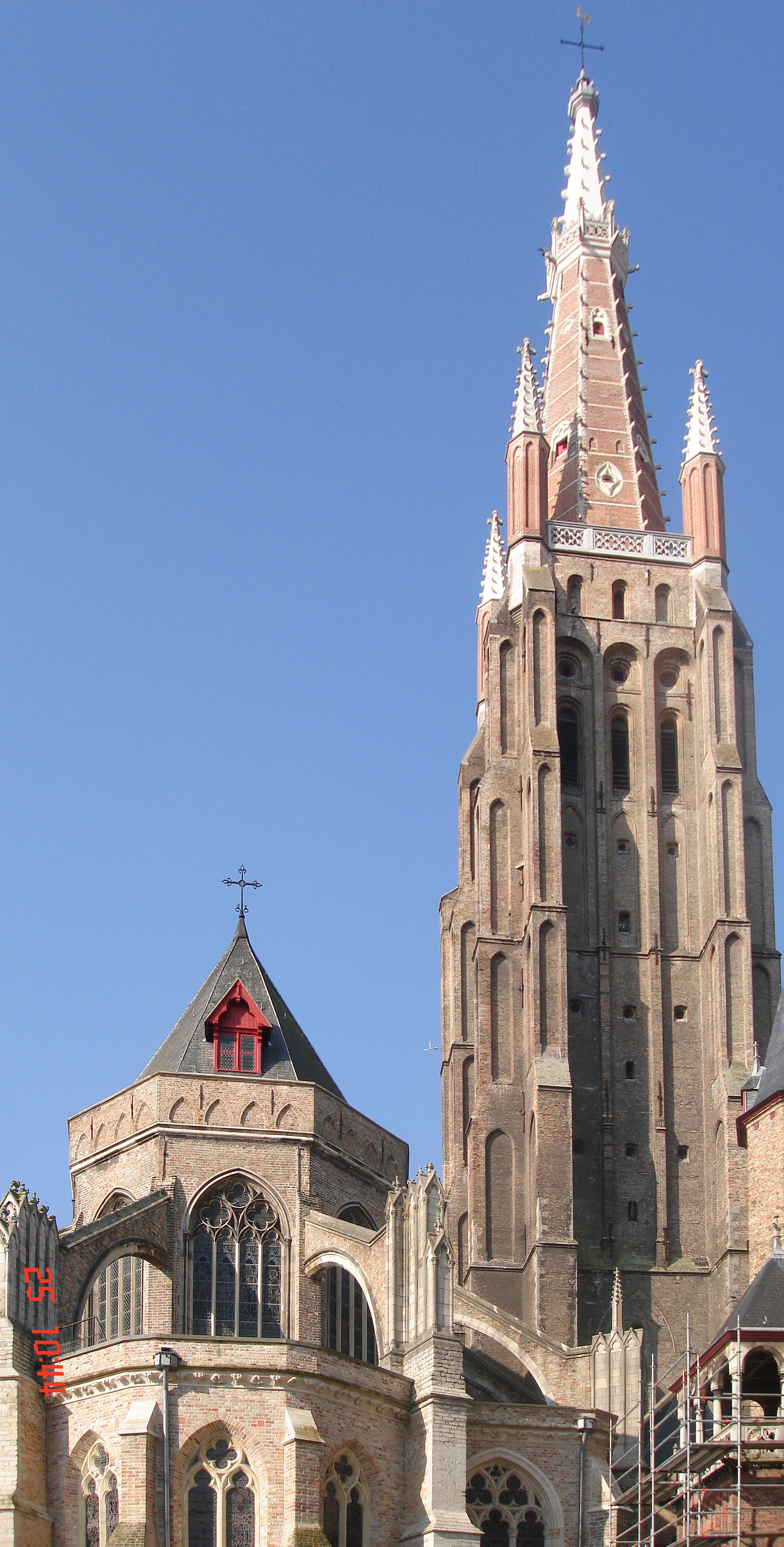 Onze Lieve Vrouwekerk, Bruges